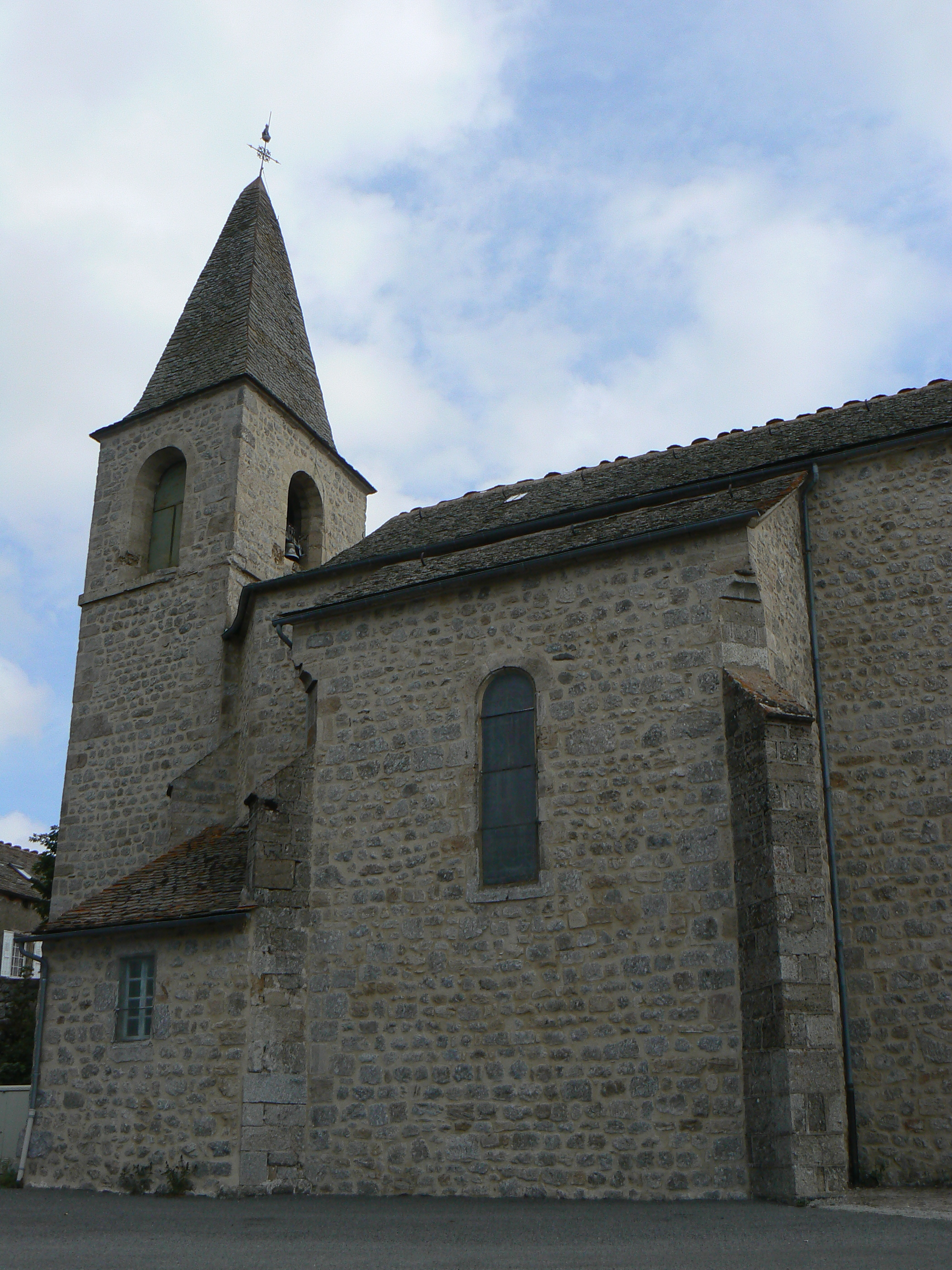 Eglise de Châteauneuf-de-Randon en Lozère